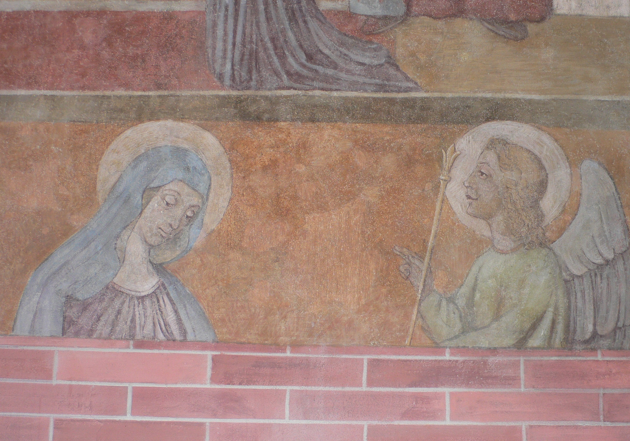 Maria und Erzengel Gabriel als Rest der historischen Fresken